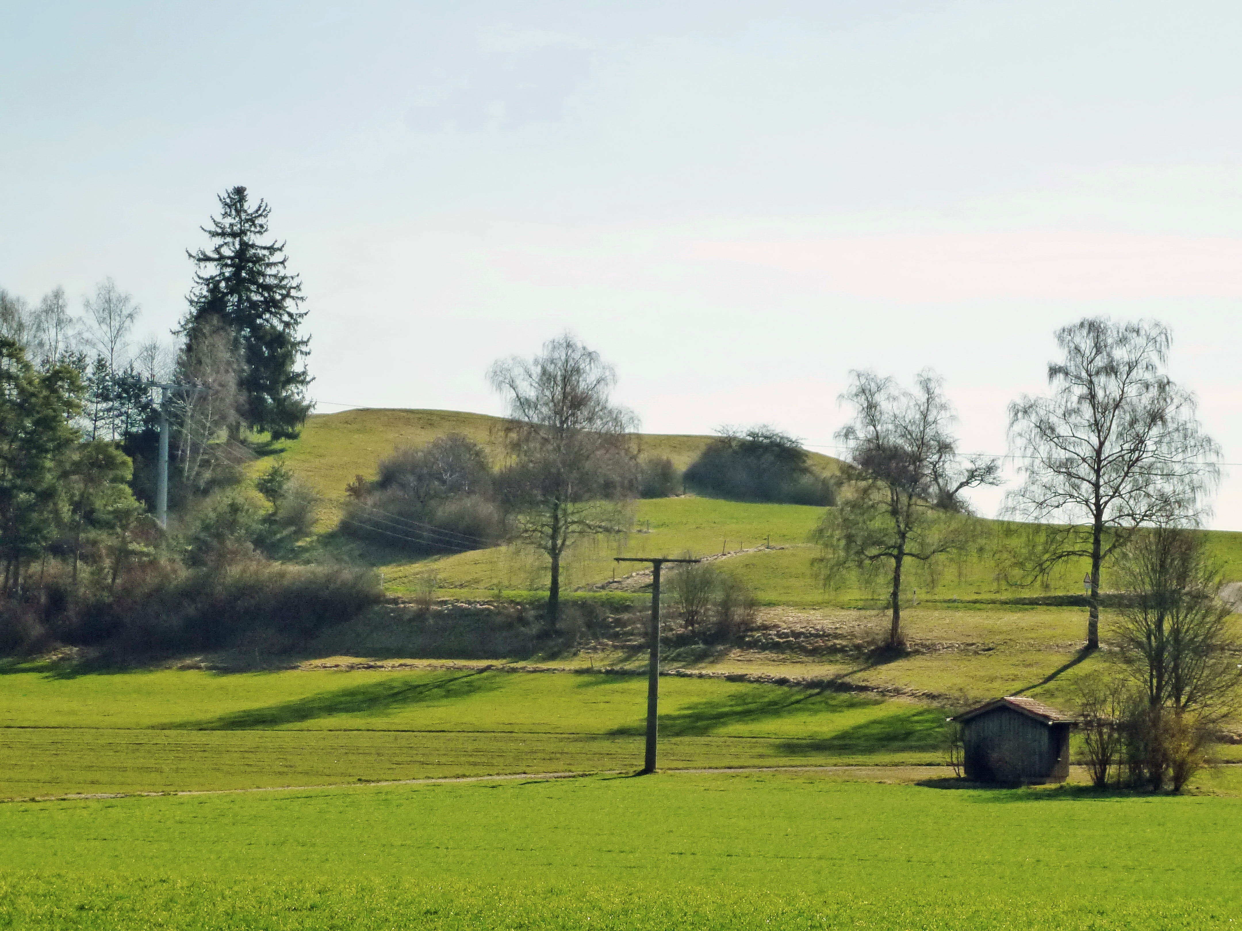 Endmoräne bei Grafrath (Ortsteil Mauern), Ansicht von Westen